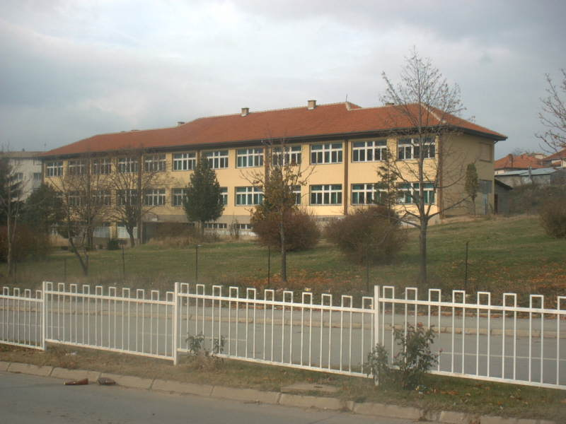 Слика на гимназијата М.М.Брицо во Делчево